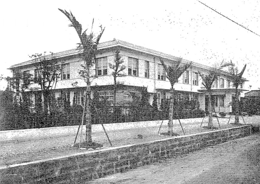 中文（台灣）: 1940年竣工的臺北鐵道醫院，位於台北市幸町，圖為醫院建築正面全景。